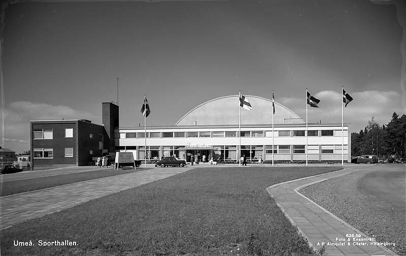 Sporthallen.; Byggnadsverk; Hälso-, sjuk- och socialvård; Simhall